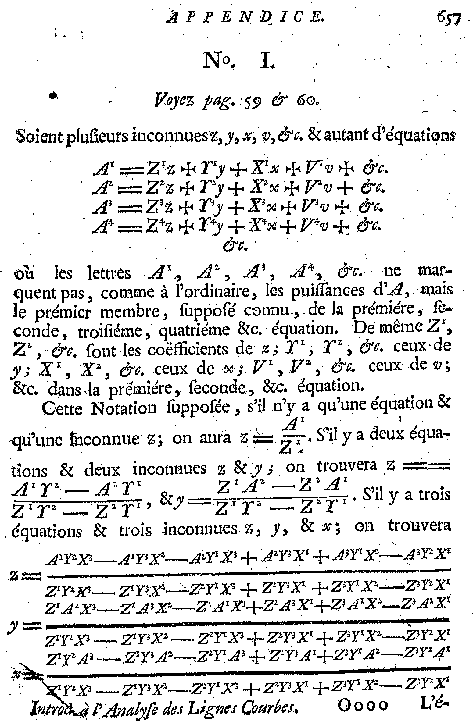 Page 657 of Gabriel Cramer's book “Introduction a l’analyse de lignes courbes algébriques”.